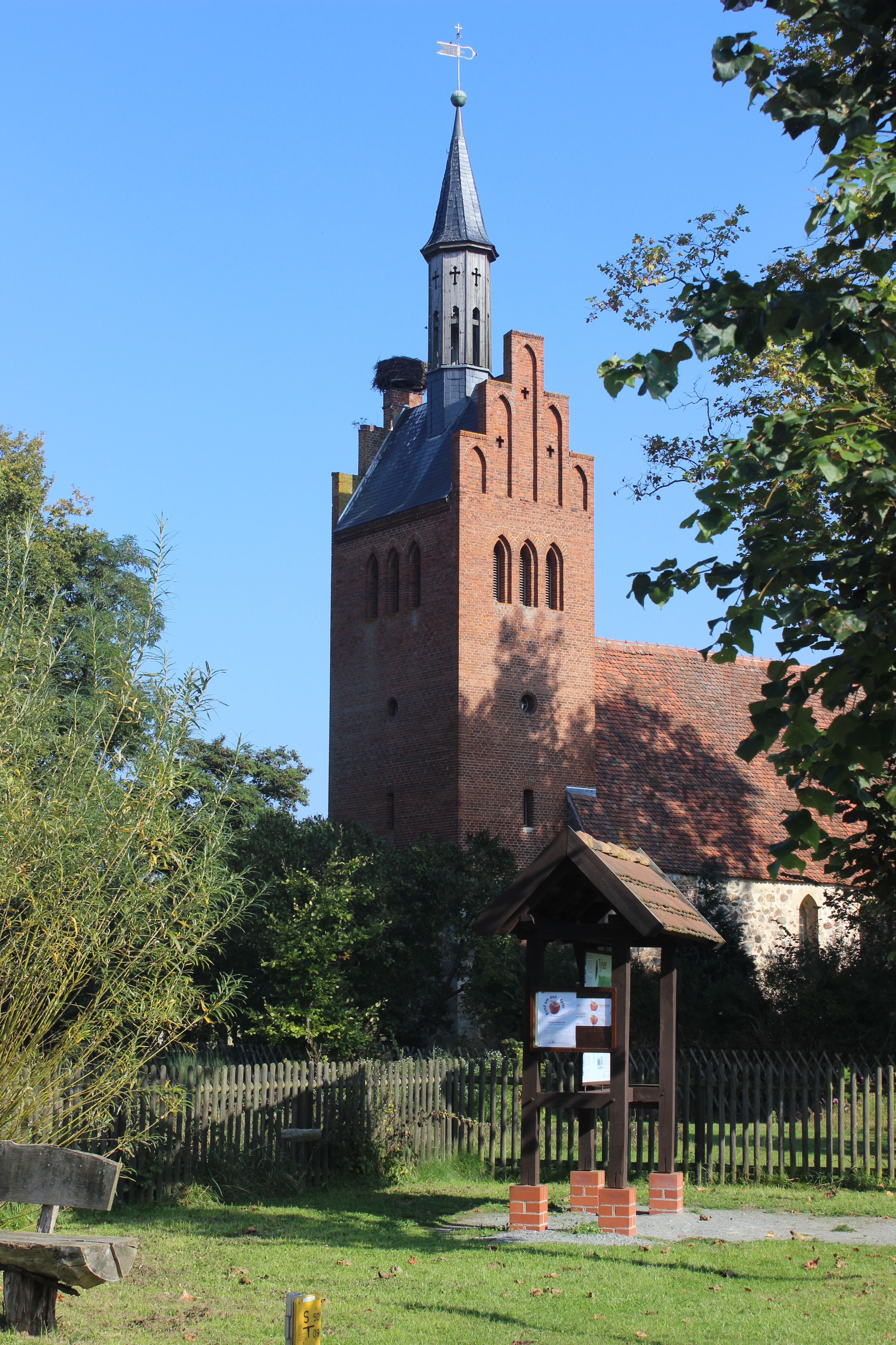 Eine schöne alte Backsteinkirche -leider war sie geschlossen